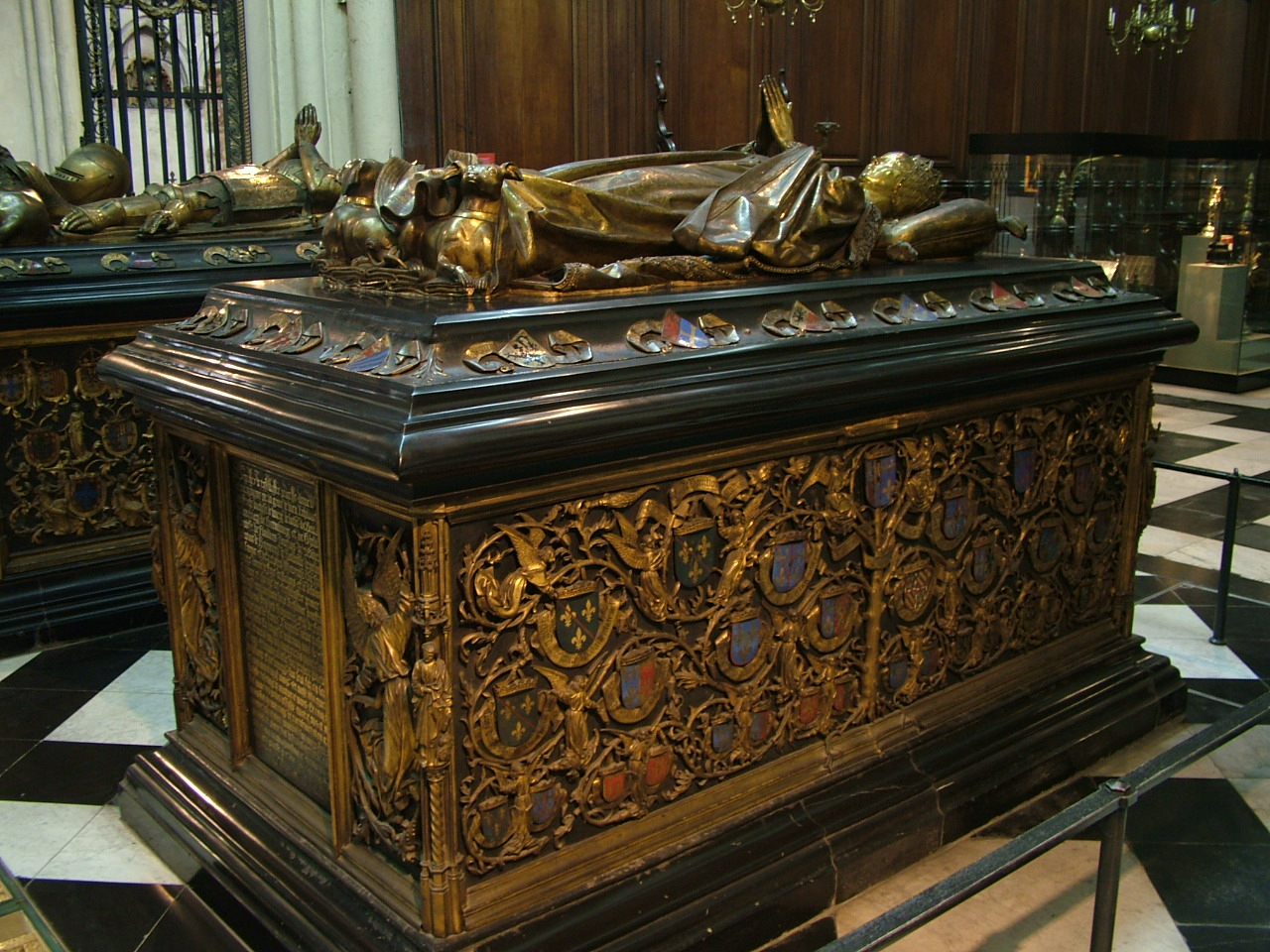 Grab der Maria von Burgund